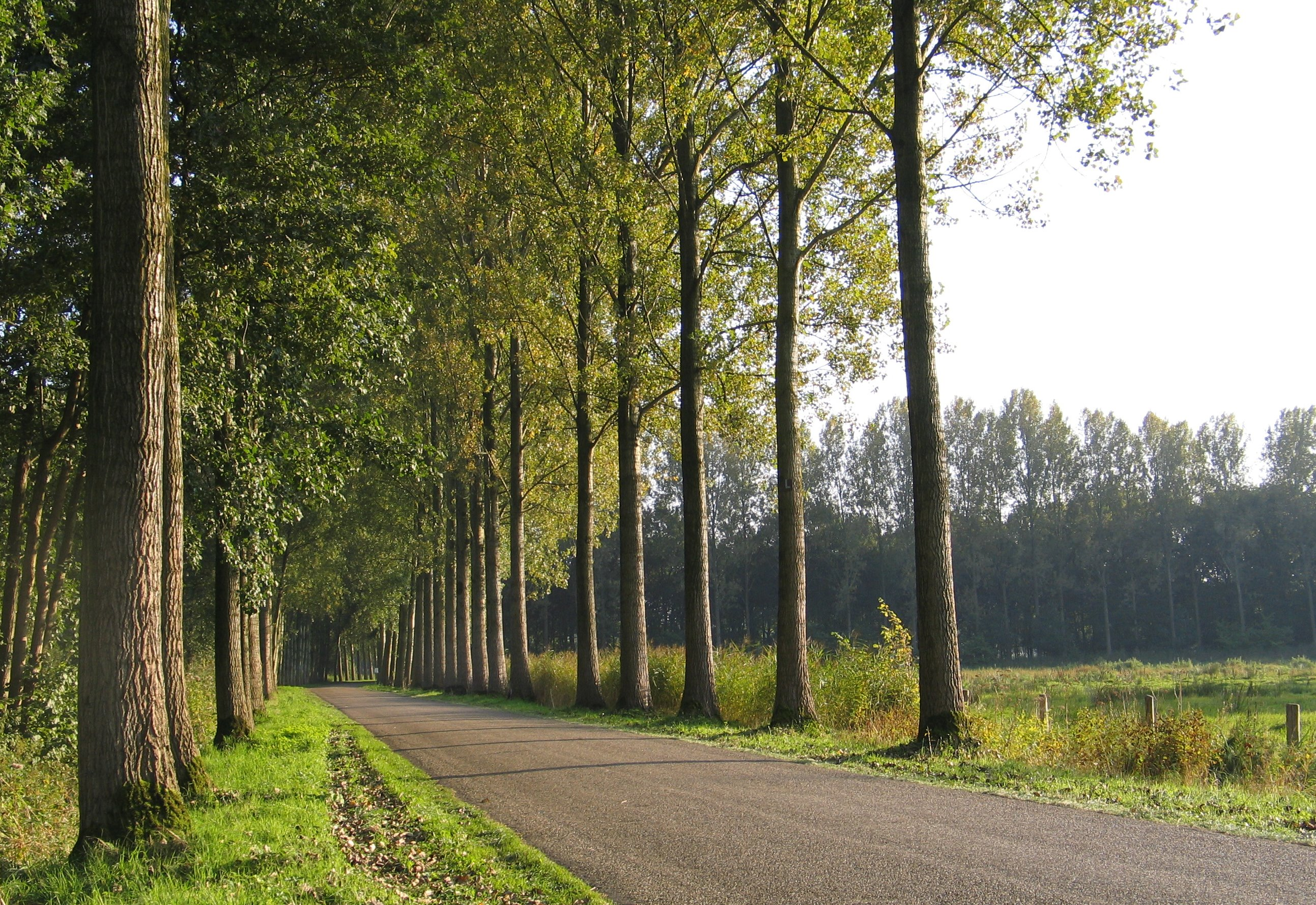 landschap ten n.o. van best (noord-brabant)